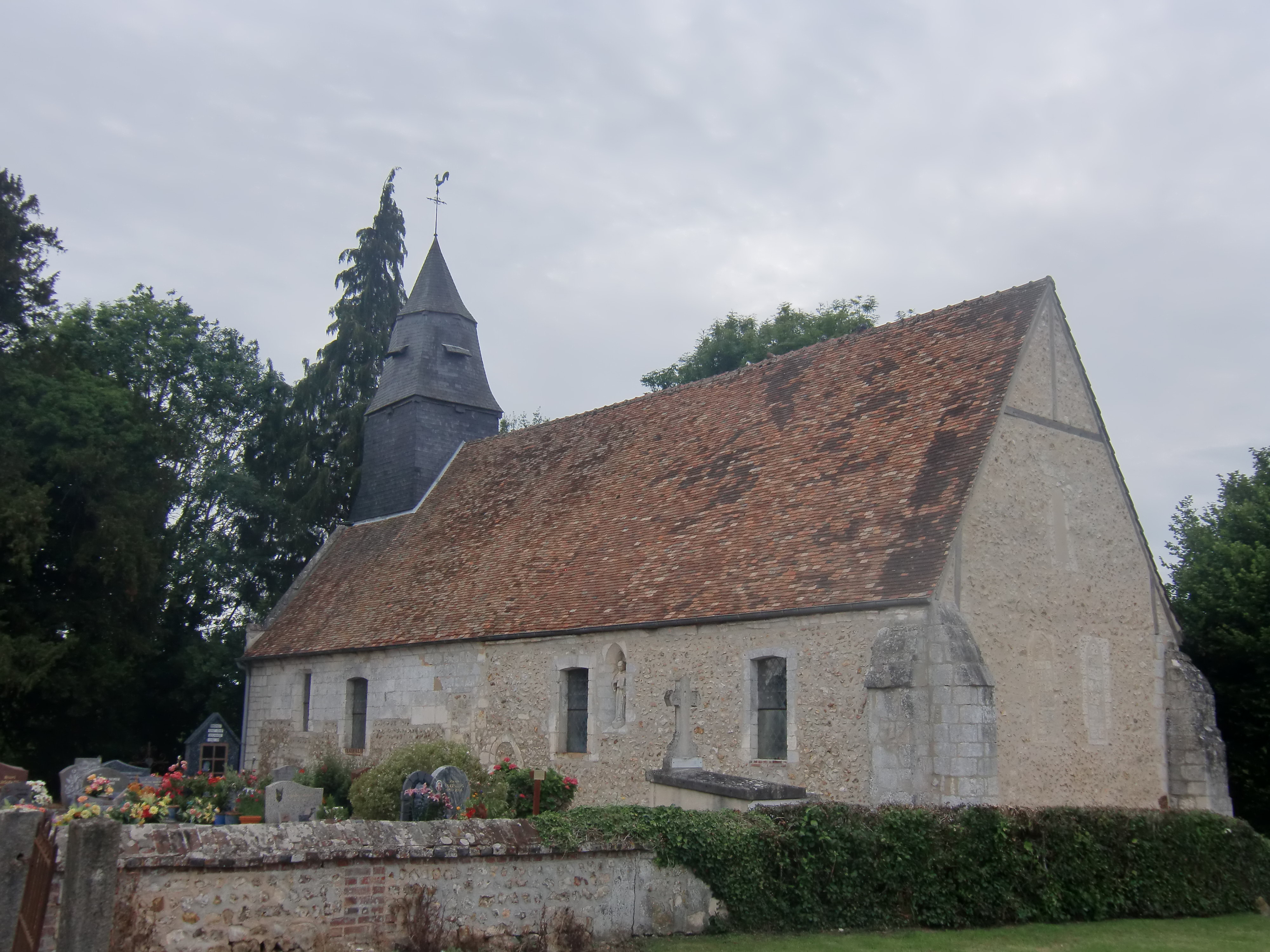 Église de Saint-Léger-du-Gennetey (Eure, Normandie, France)